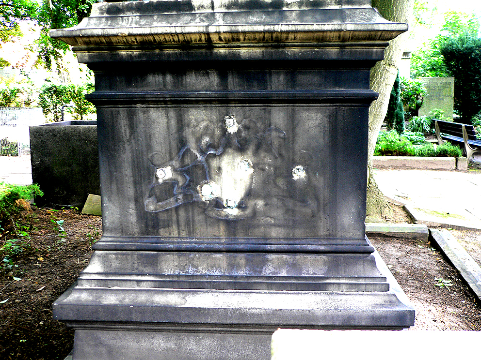 Grabmal von Carl Otto Unico Ernst von Malortie, Rückseite mit abgebrochener Wappen-Verzierung